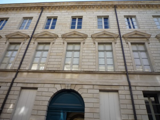 Nîmes (Gard, France), 10 Grande-Rue, hôtel particulier Rivet, actuellement siège de l'École supérieure des beaux-arts.